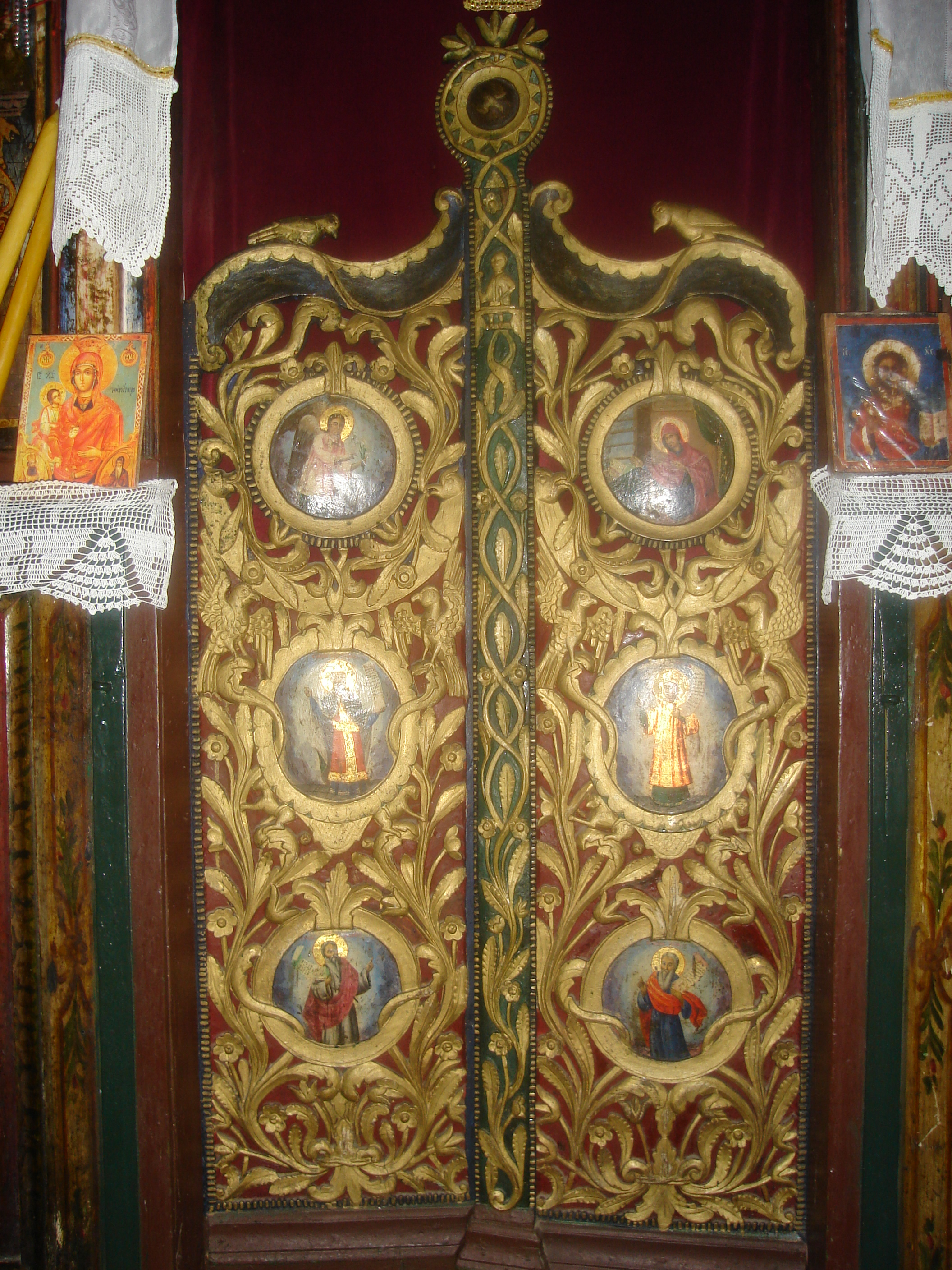 Косово и Метохија